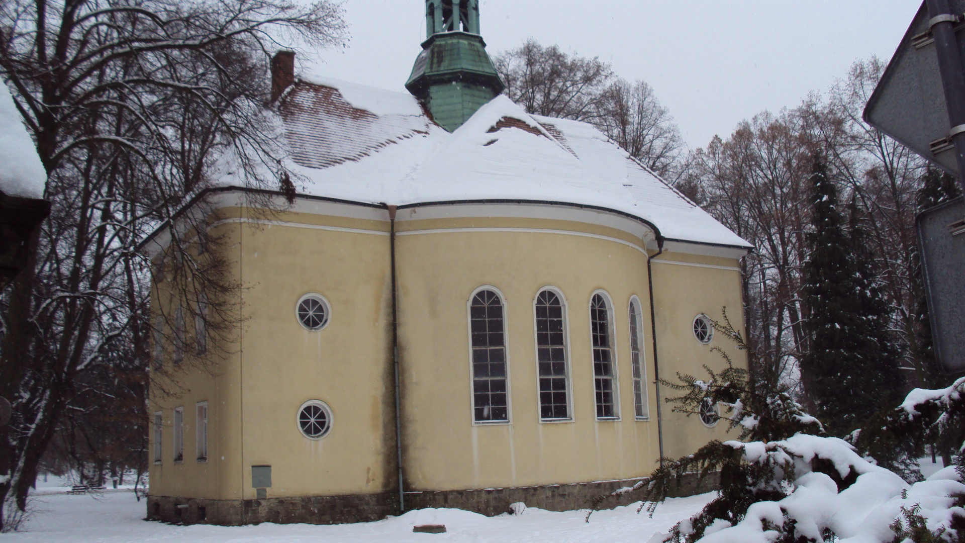 Kostel československé církve husitské ve velkém parku